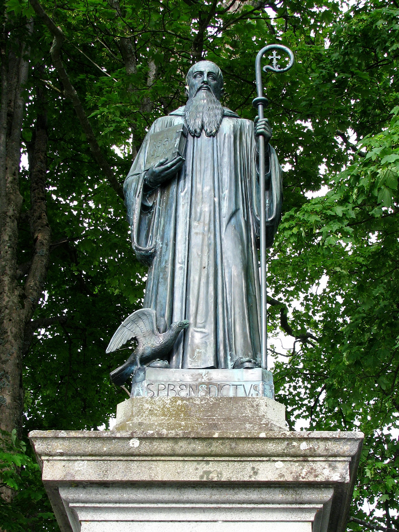 Statue of Saint Benedict in Einsiedeln (SZ) in Switzerland